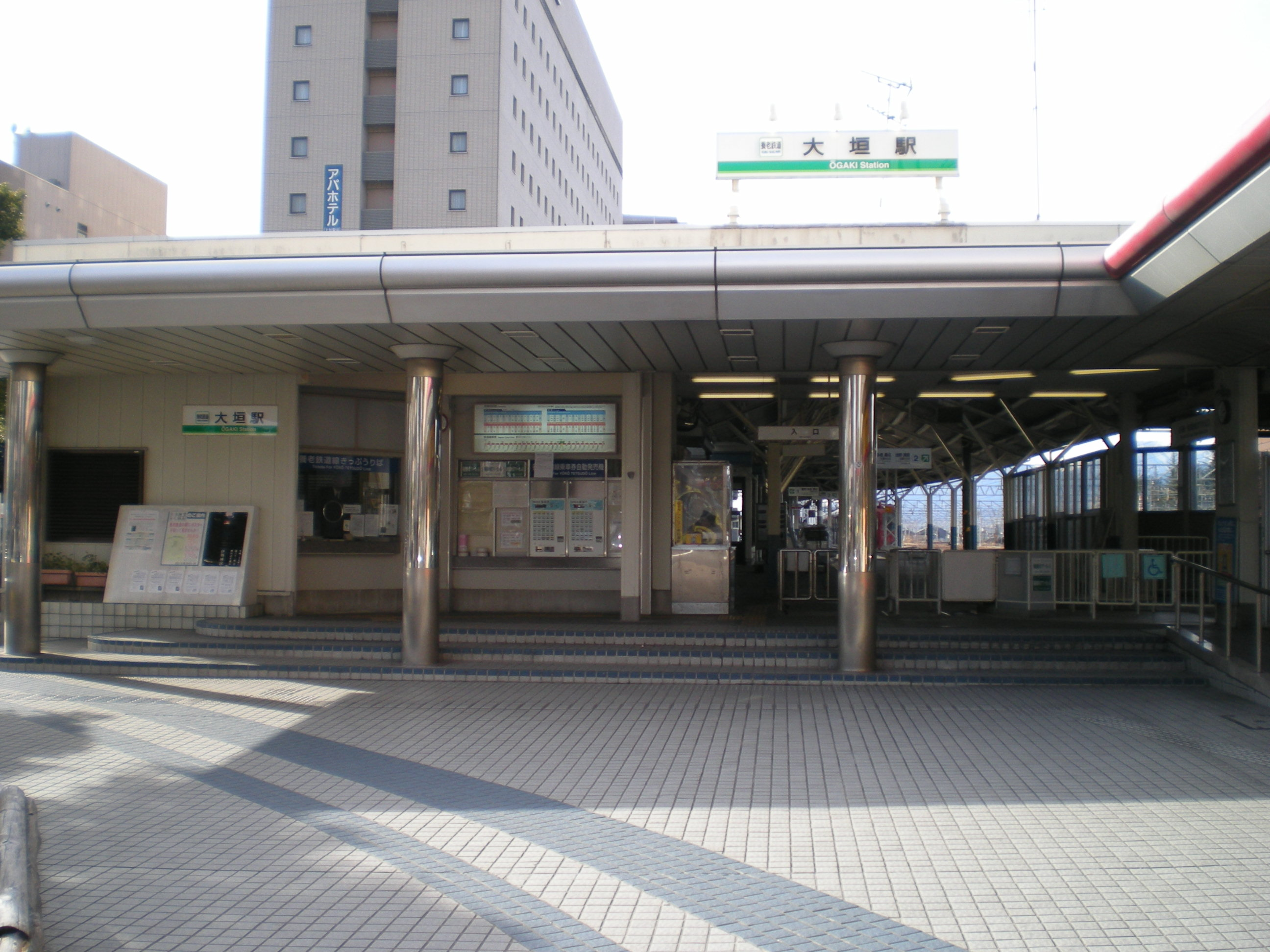 養老鉄道大垣駅